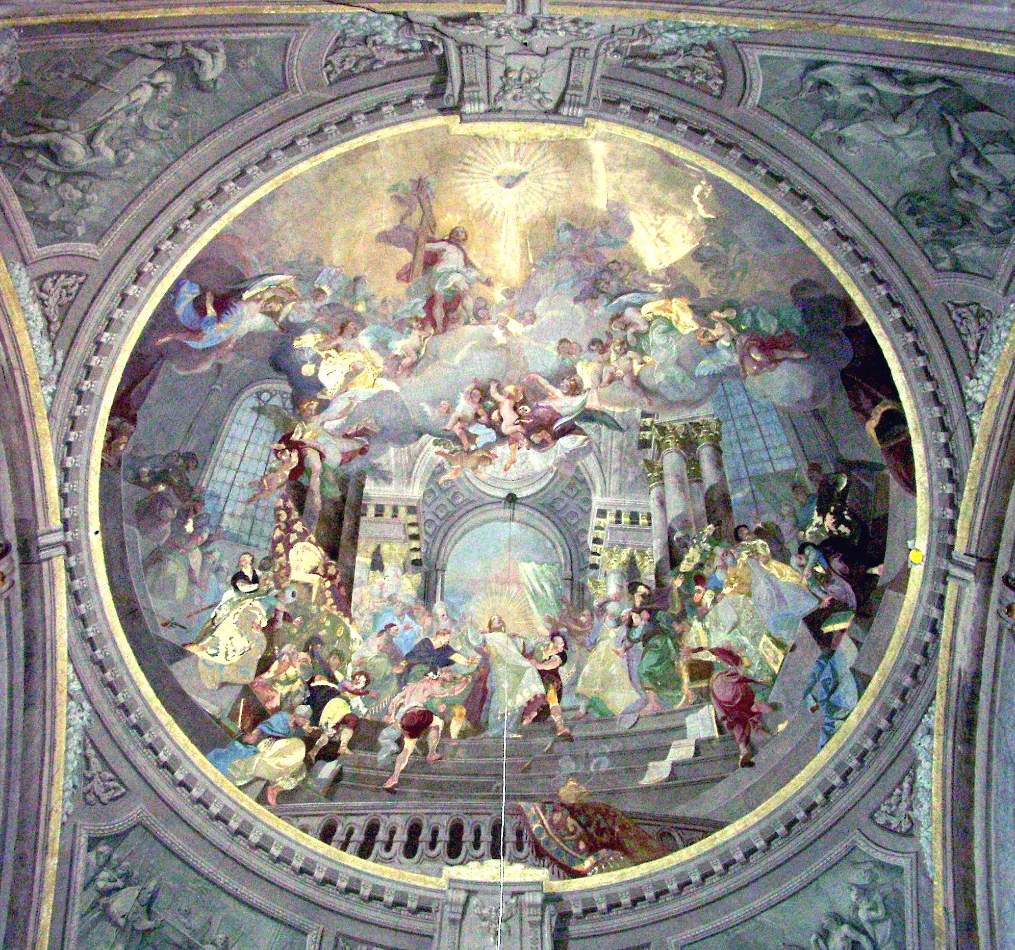 (Pápai nagytemplom)